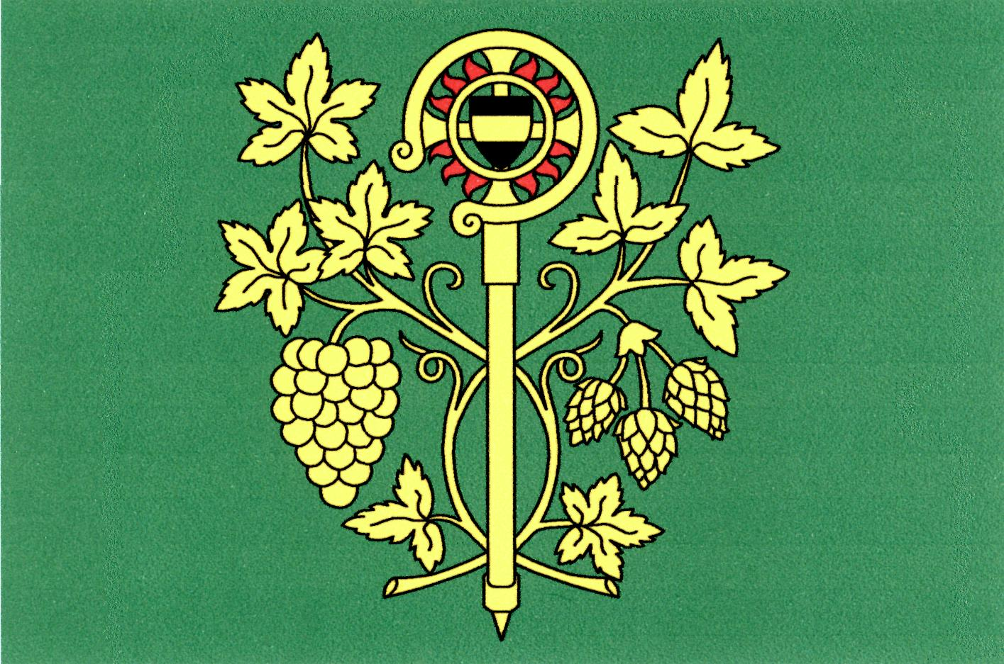 Vlajka obce Blšany u Loun